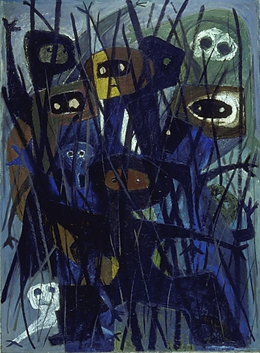 Charles Daudelin, La Brousse, 1954-1958, huile sur panneau de fibre de bois, 142 x 106 cm. © Succession Charles Daudelin /SODRAC Collection : Musée national des beaux-arts du Québec (MNBAQ) Photo : MNBAQ: Patrick Altman